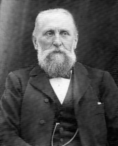 Friedrich Adler Architekt, Foto um 1900